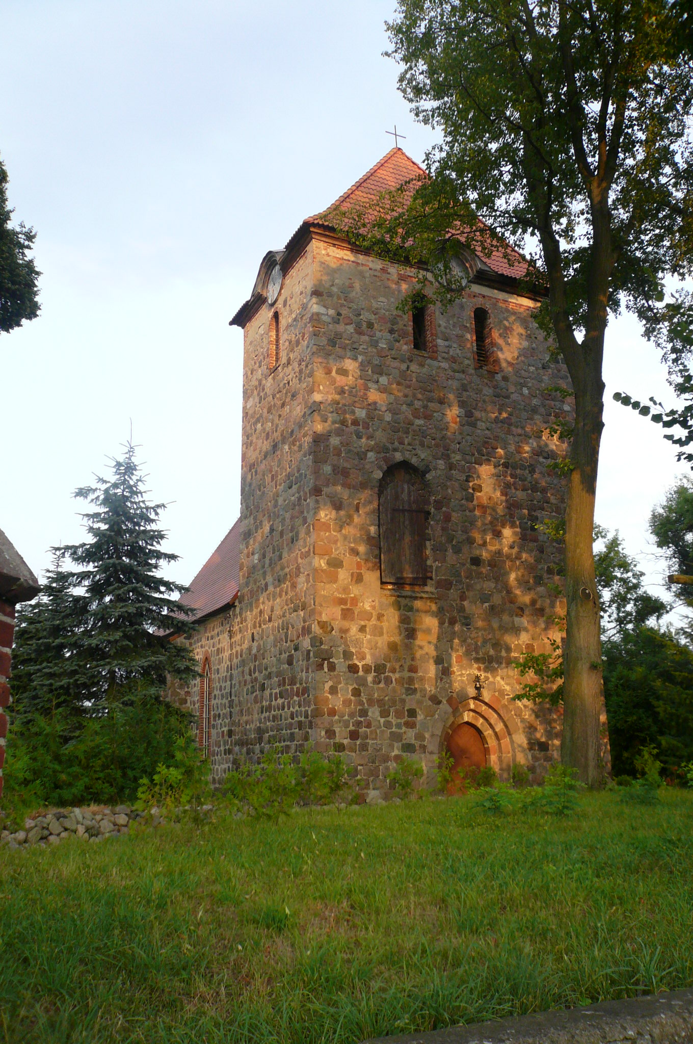 Dolsko - rzymskokatolicki kościół filialny p.w. św. Elżbiety, 2 poł. XIII